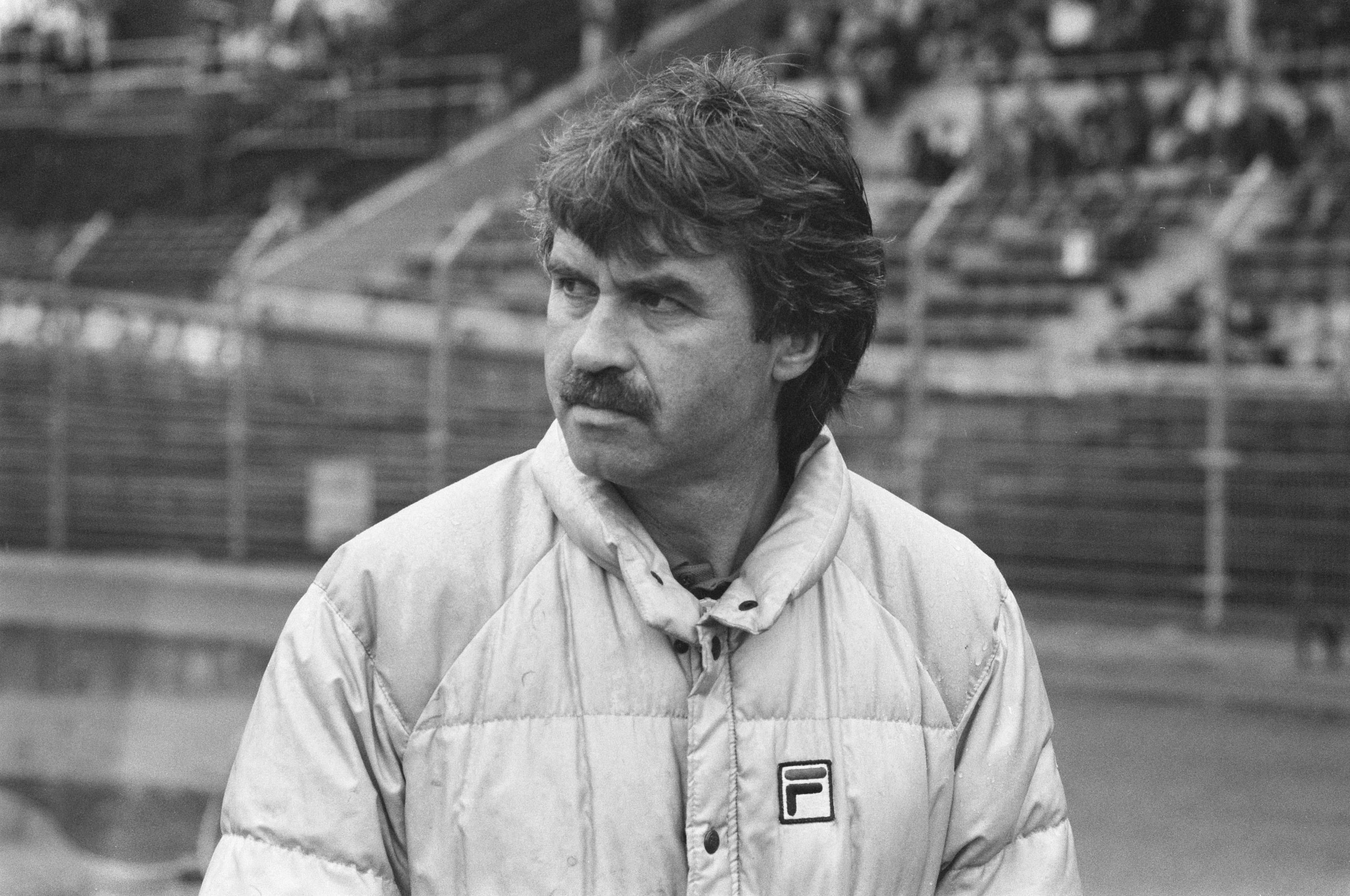 Collectie / Archief : Fotocollectie Anefo Reportage / Serie : [ onbekend ] Beschrijving : Ajax tegen PSV 2-0; trainer Guus Hiddink , kop Datum : 9 oktober 1988 Trefwoorden : sport, trainers, voetbal Persoonsnaam : Guus Hiddink Instellingsnaam : AJAX, PSV Fotograaf : Croes, Rob C. / Anefo Auteursrechthebbende : Nationaal Archief Materiaalsoort : Negatief (zwart/wit) Nummer archiefinventaris : bekijk toegang 2.24.01.05 Bestanddeelnummer : 934-3348